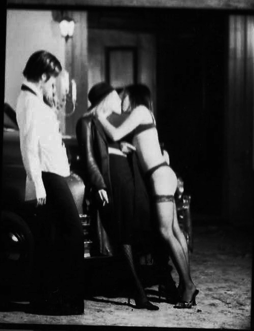 Ensaio fotográfico no Solar de Beirós